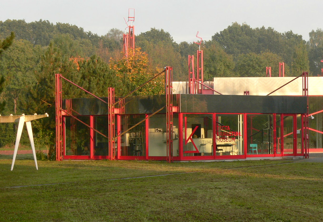 Servicegebäude des Kragstuhlmuseums